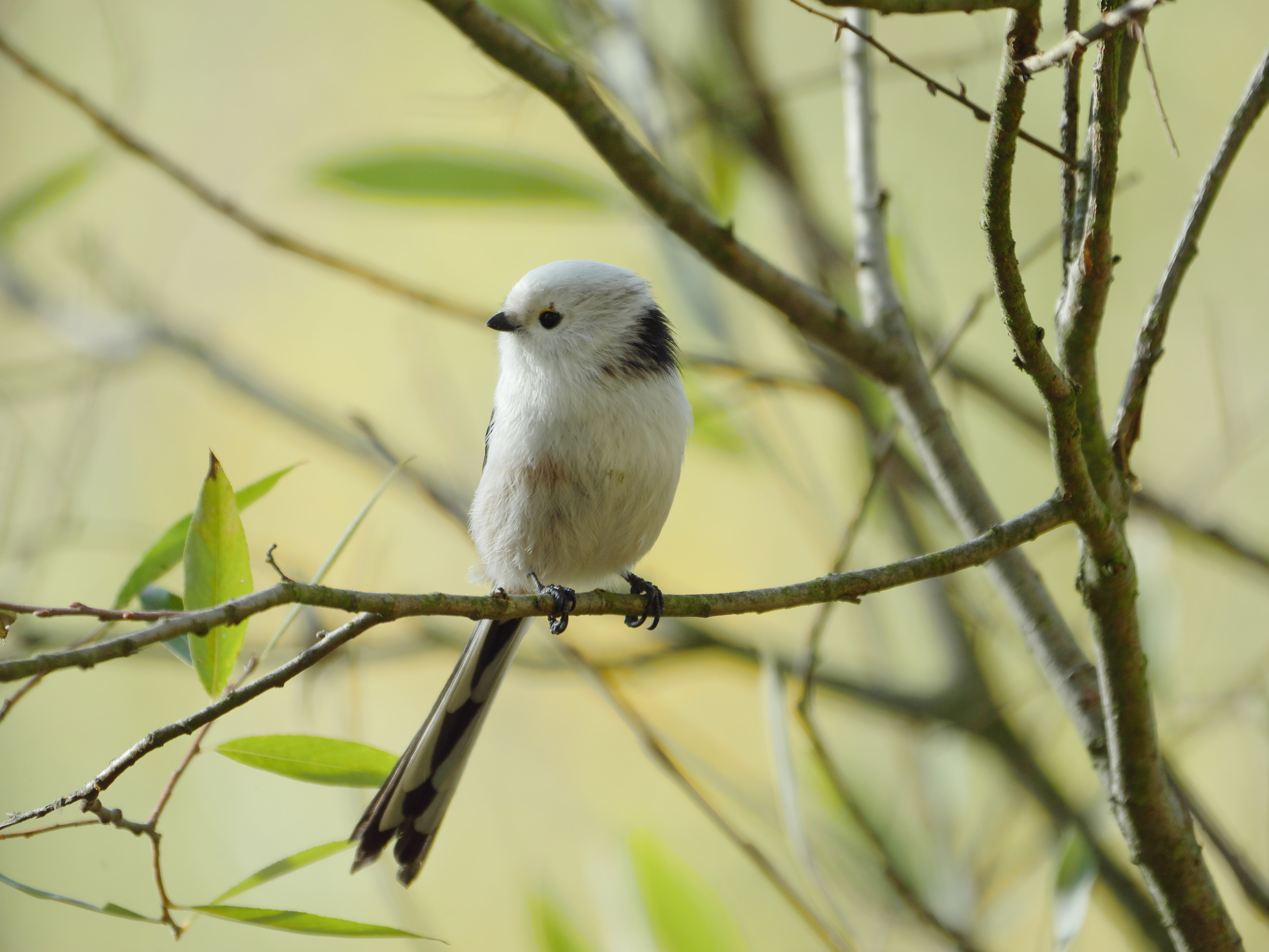 Schwanzmeise (Aegithalos caudatus caudatus) im Parks Range Gelände in Berlin-Lichterfelde.